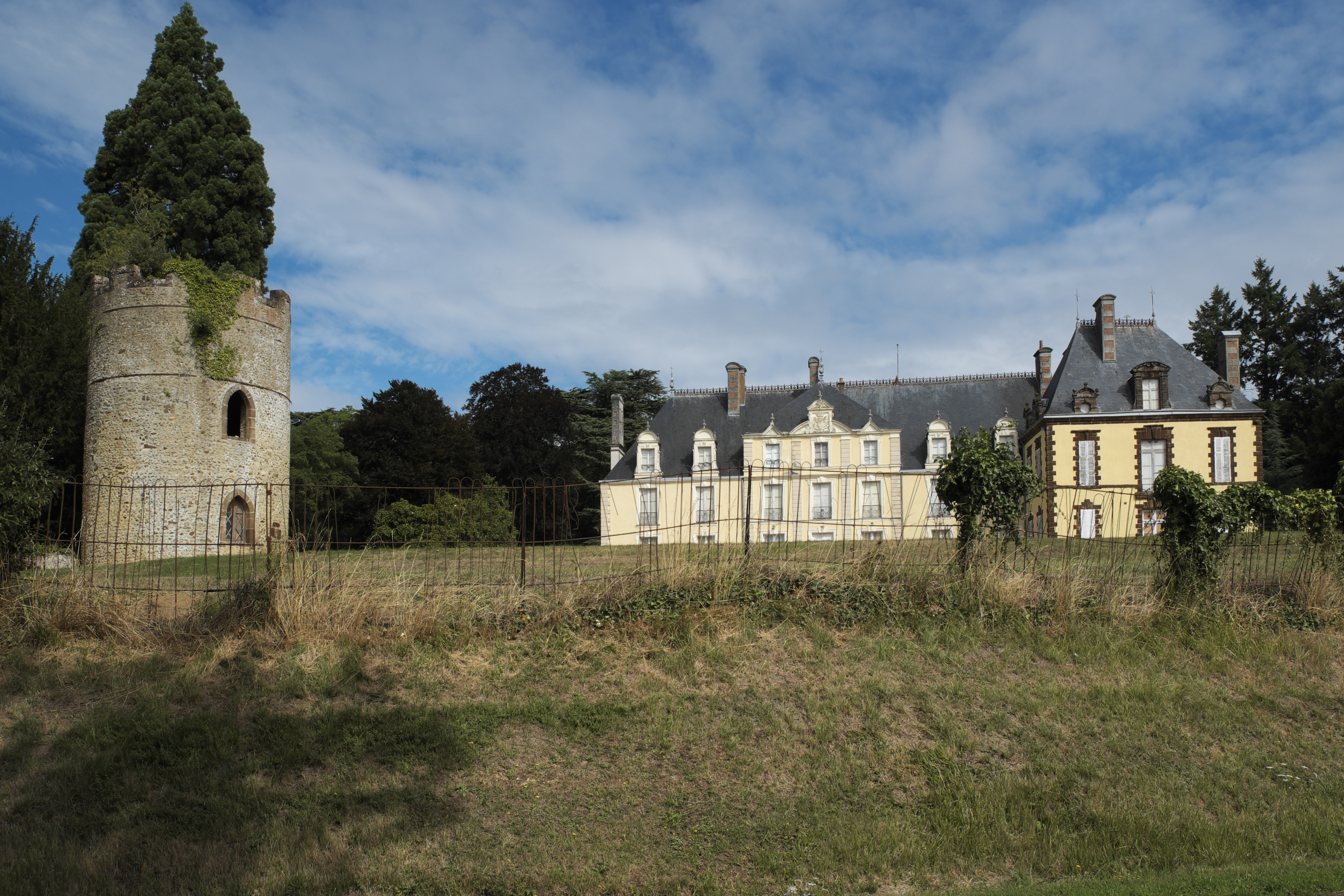 Château de Baillou in Baillou im Département Loir-et-Cher (Centre-Val de Loire/Frankreich)